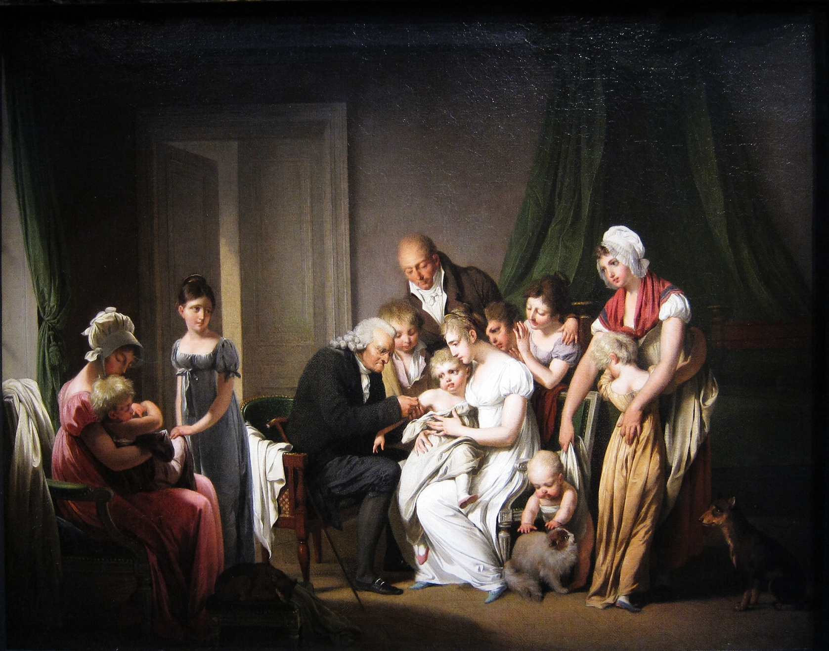 La vaccine ou Le préjugé vaincu au Wellcome Institute for the History of Medecine de Londres.